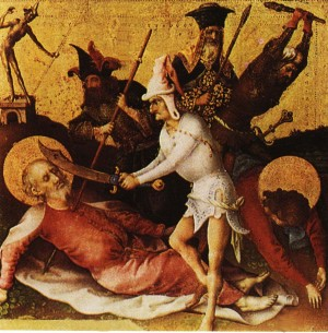 Stefan Lochner, Die Apostelmartyrien. The Martyrdom of the Apostles (St Simon et St Jude), 1435-40. Frankfurt, Stadelsches Kunstinstitut